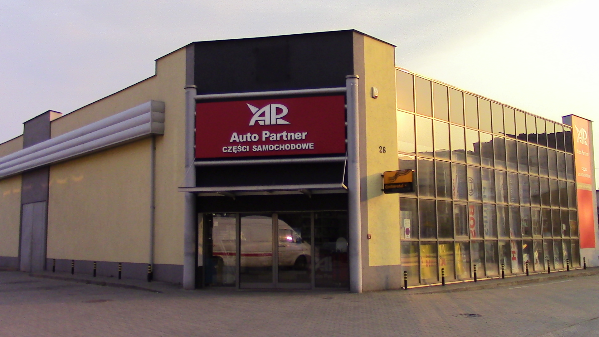 Auto Partner